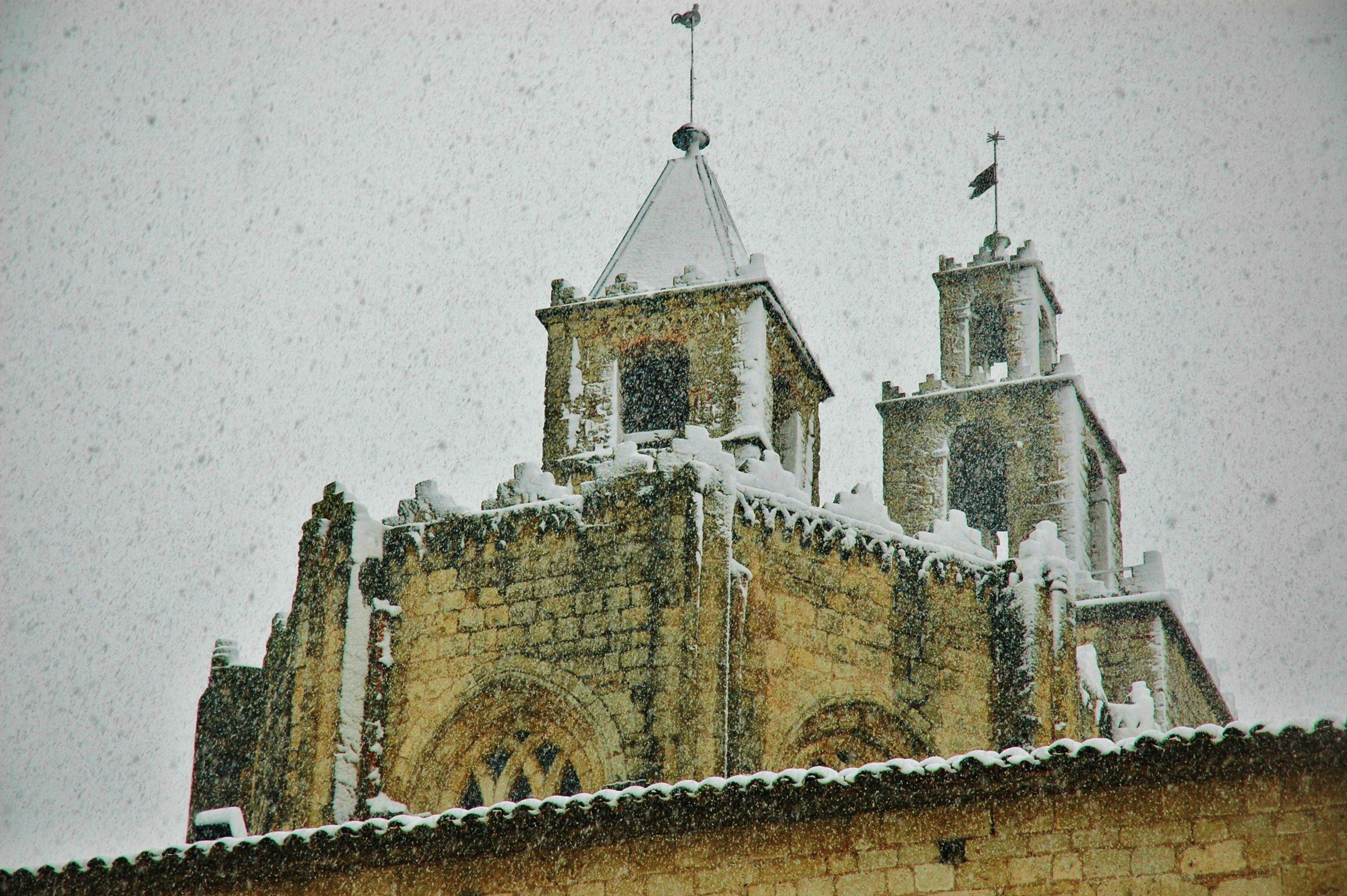 Monestir de Sant Cugat nevat